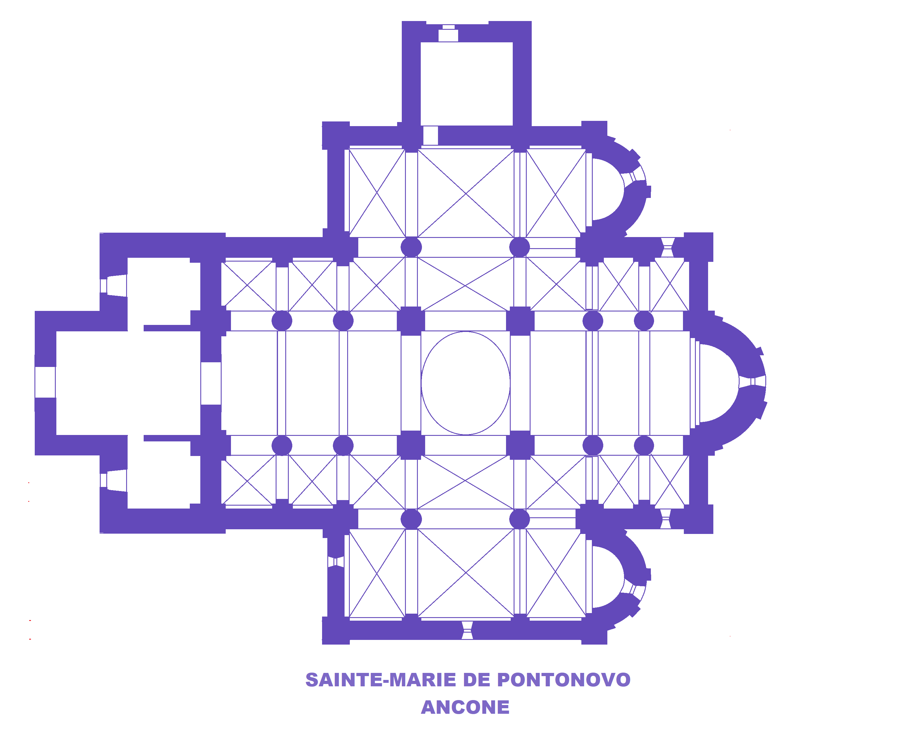 Ancone, Sainte-Marie de Pontonovo, Plan